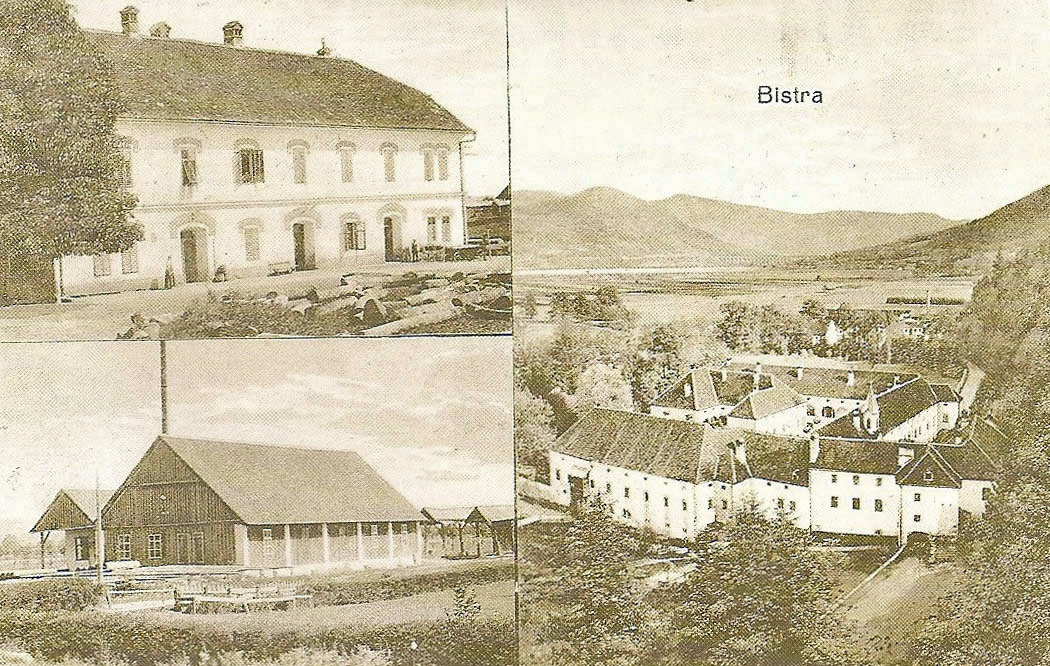 Razglednica Bistre pri Vrhniki.